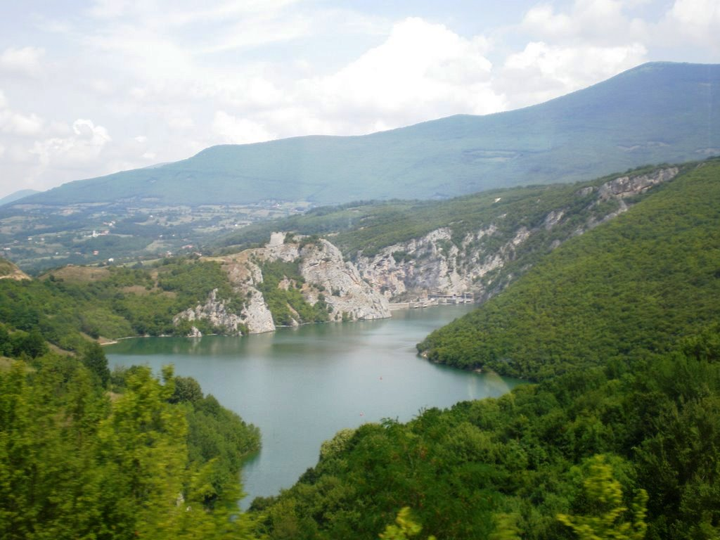 Jezero Bočac i istoimena hidroelektrana (vidi se u pozadini). Na rijeci Vrbas.